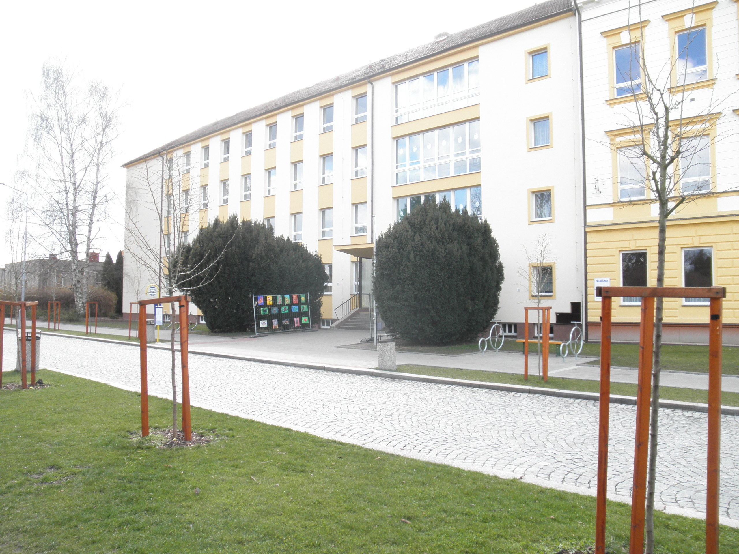 Holice